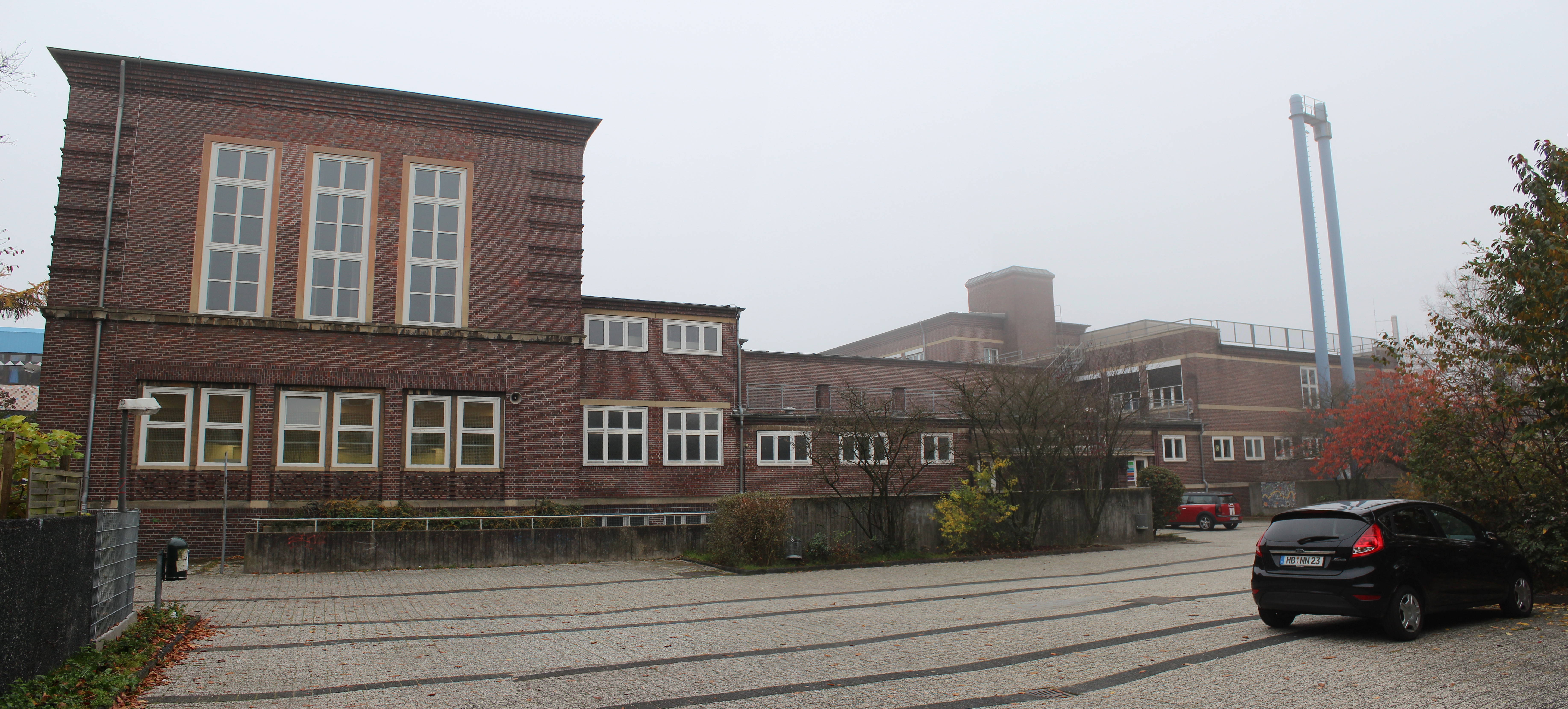 Volksschule Delmestraße in Bremen, Delmestraße 145. Das abgebildete Objekt ist ein geschütztes Kulturdenkmal in der Freien Hansestadt Bremen, mit der Nr. 0312 beim Landesamt für Denkmalpflege registriert.